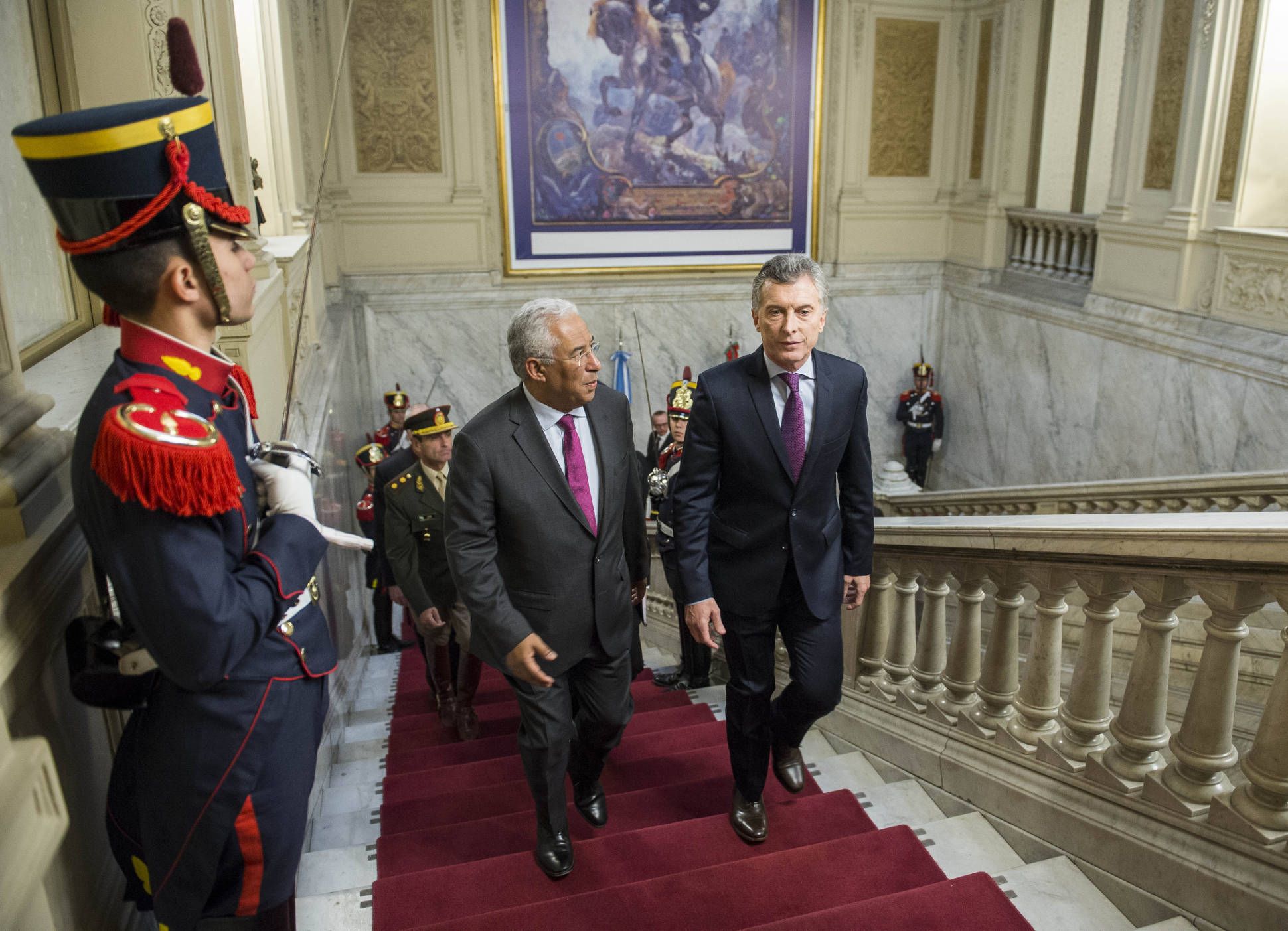 El presidente Mauricio Macri y el primer ministro de Portugal, Antonio Costa, reafirmaron su compromiso de estrechar los vínculos entre ambos países y continuar trabajando para lograr más rápidamente una integración entre el Mercosur y la Unión Europea.